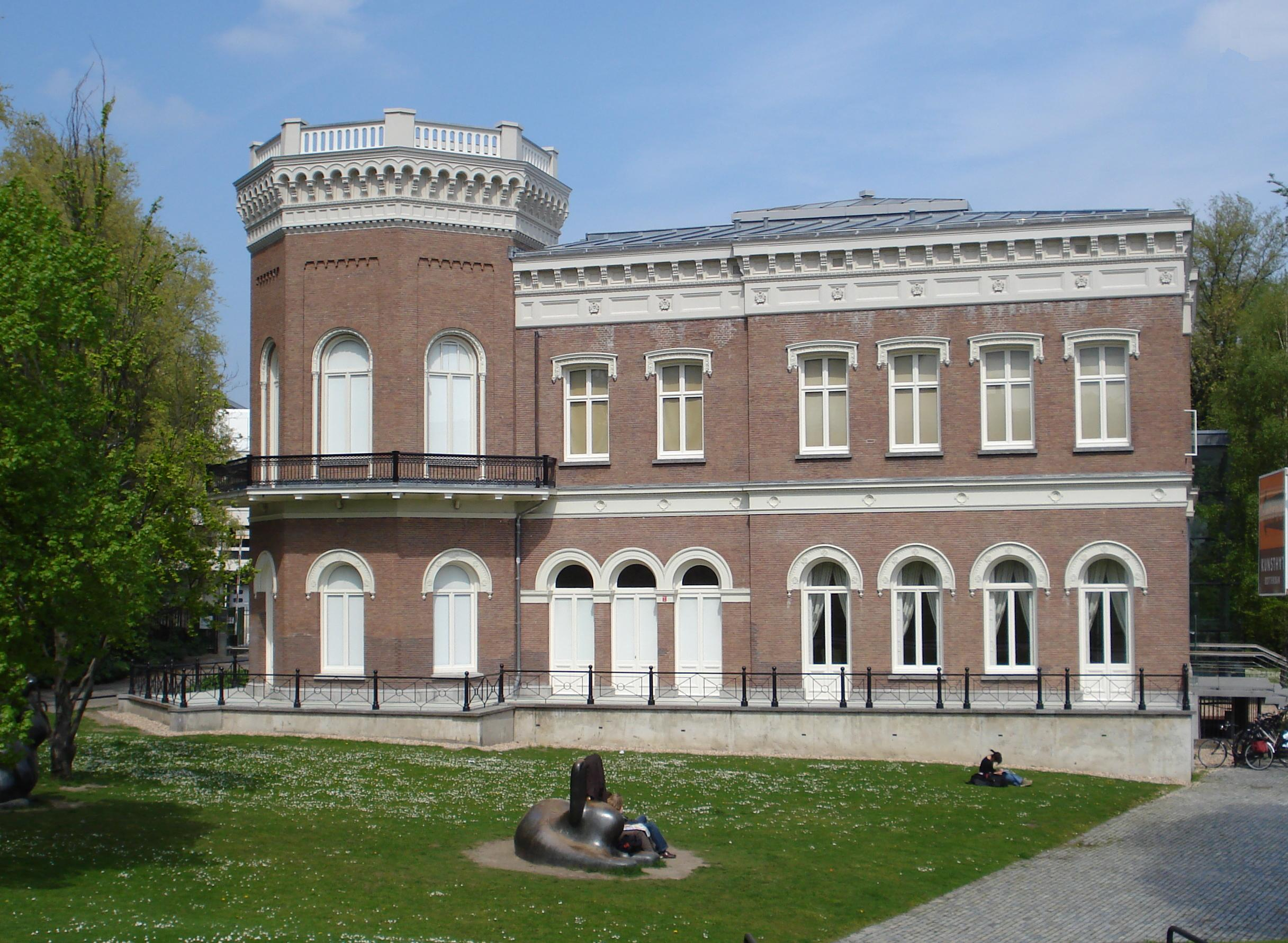 Rotterdam, Westzeedijk 345. Villa Dijkzicht. Rijksmonument.